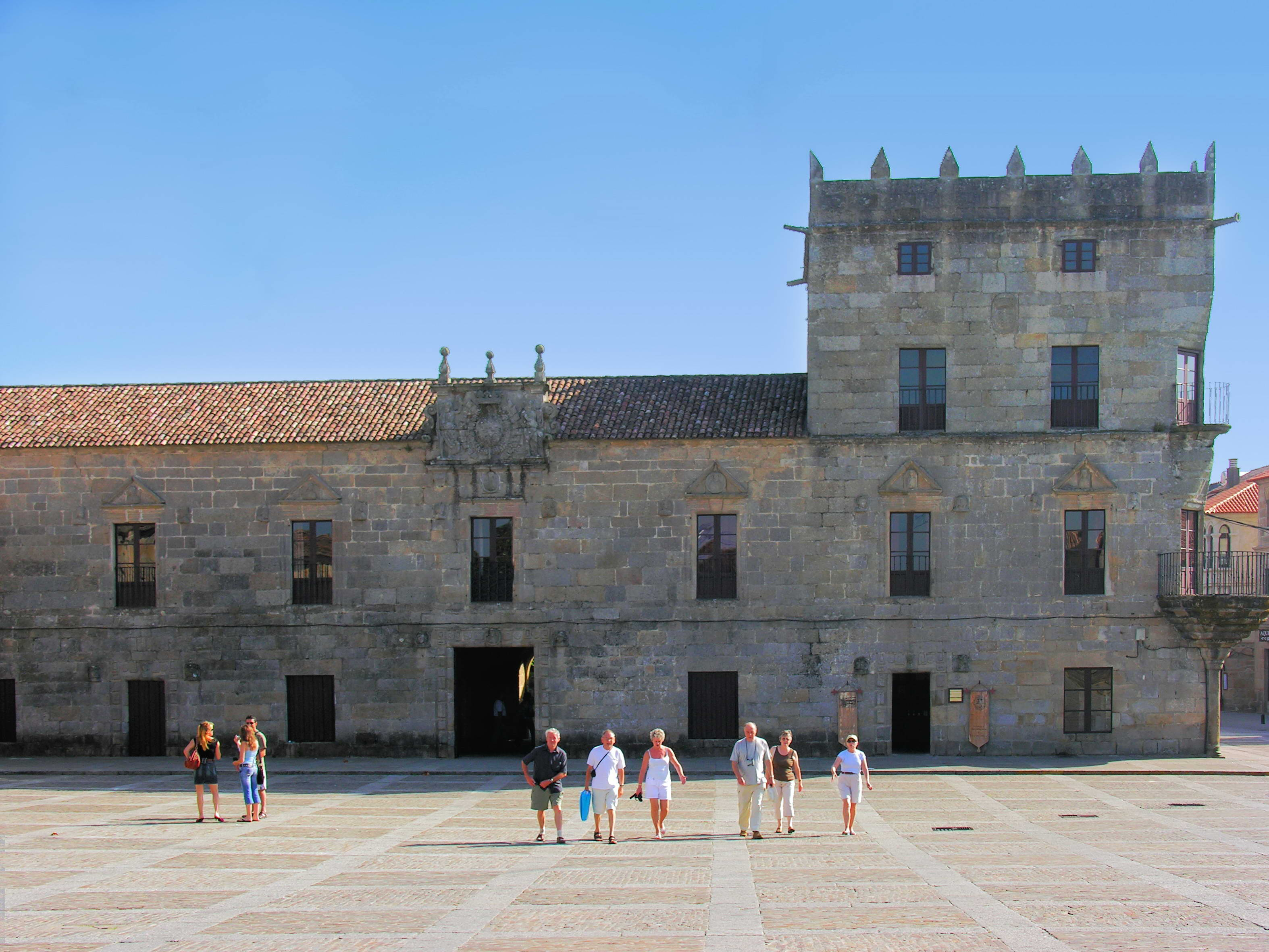 Entrada a Cambados, Galicia Publish by= Luis Miguel Bugallo Sánchez. Self made.